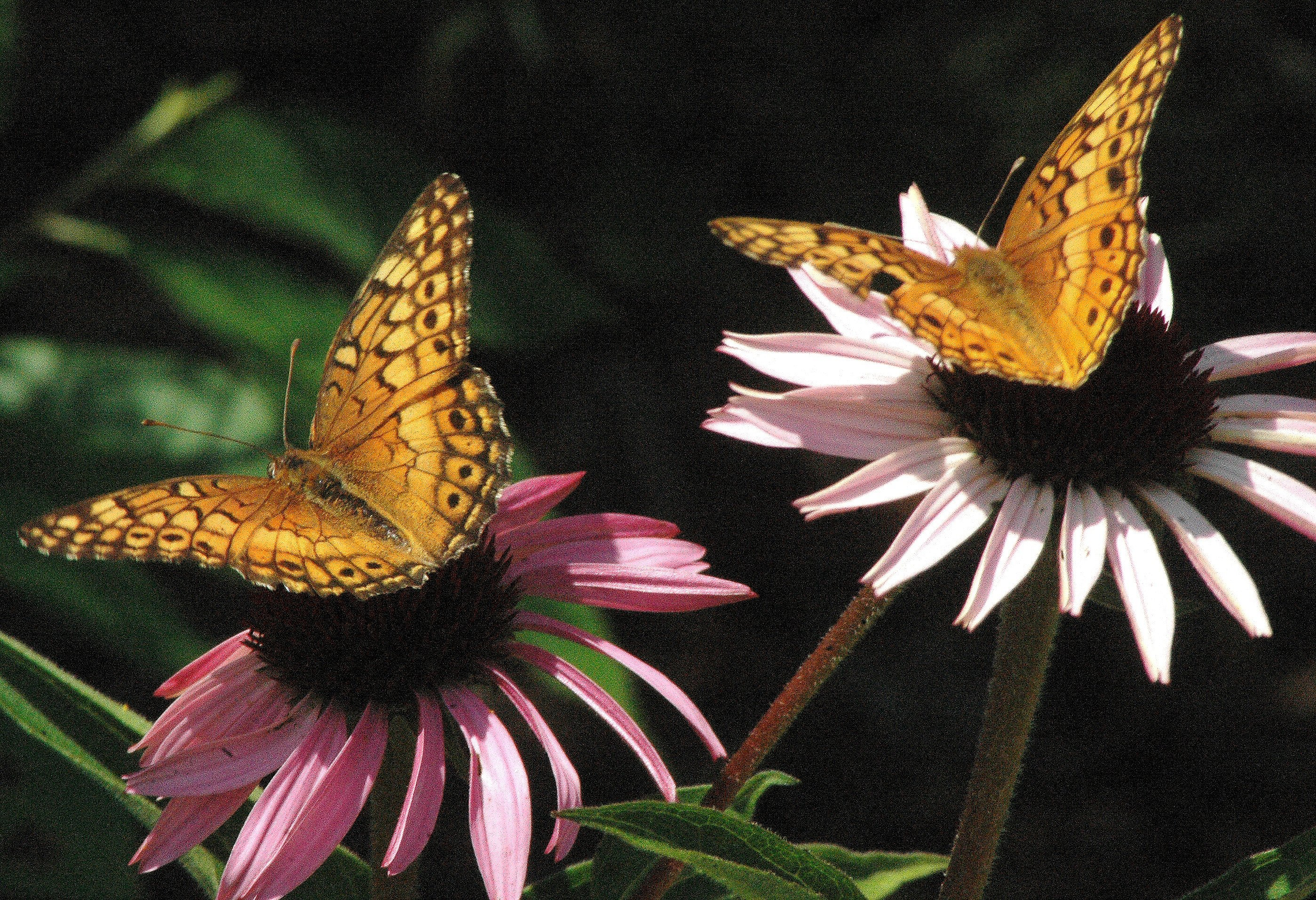 Variegated Fritillaries, Euptoieta claudia